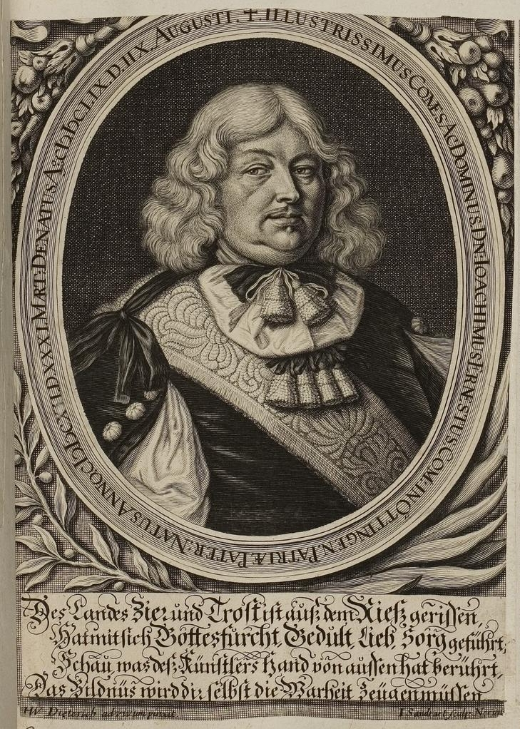 Grafik aus dem Klebeband Nr. 1 der Fürstlich Waldeckschen Hofbibliothek Arolsen Motiv: Graf Joachim Ernst von Öttingen